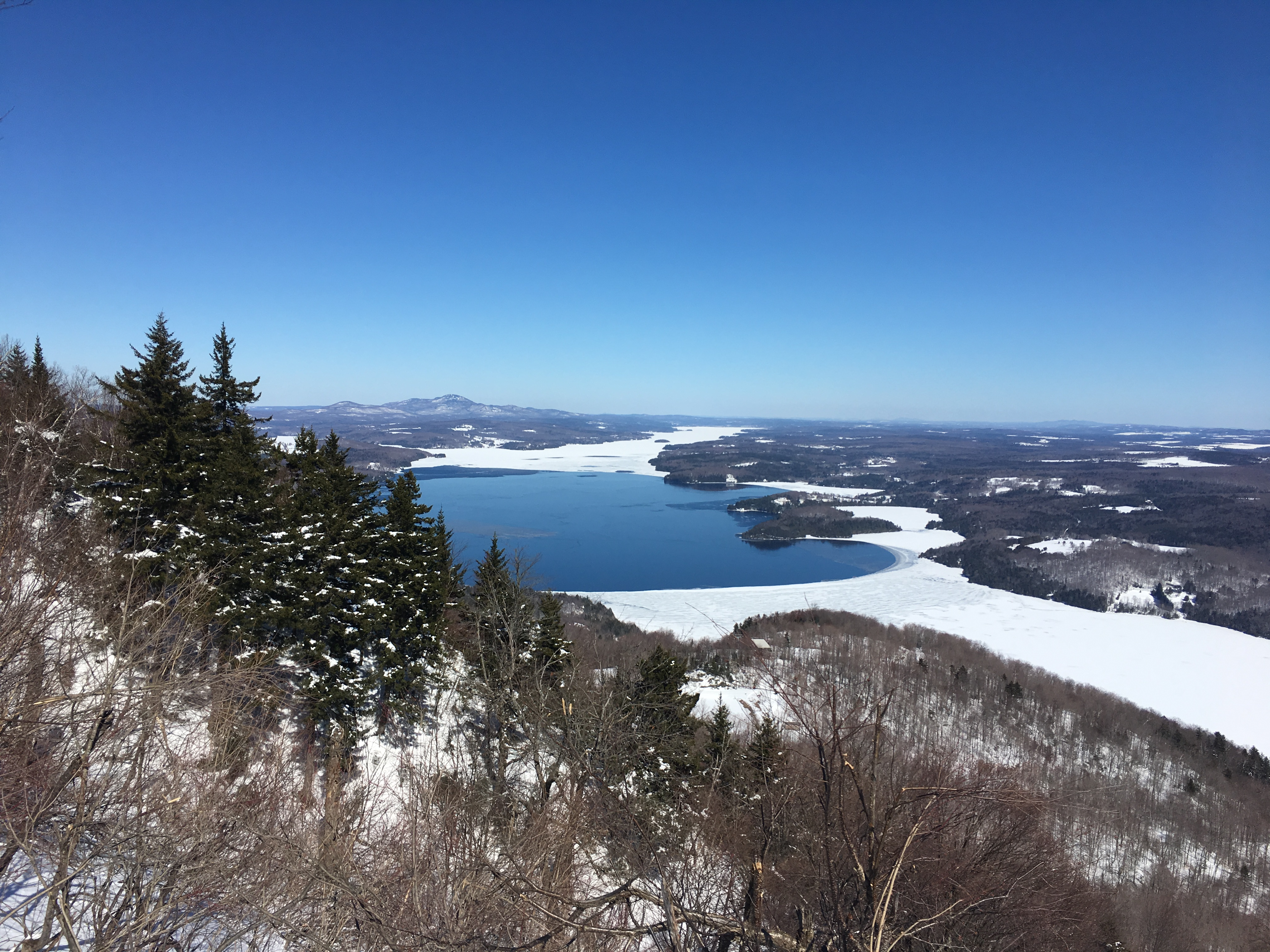 lac Memphrémagog depuis le mont Owl's Head à Mansonville